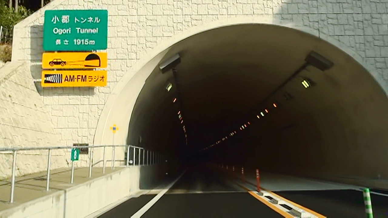 2012年1月 長谷IC付近